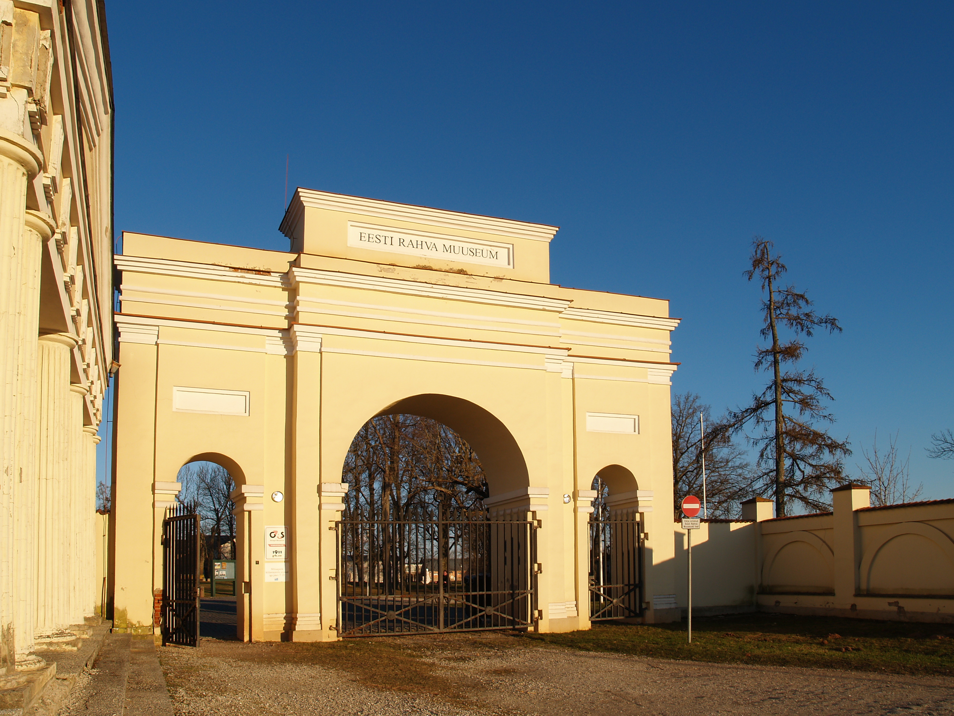 Raadi mõisa värav ja väravahoone